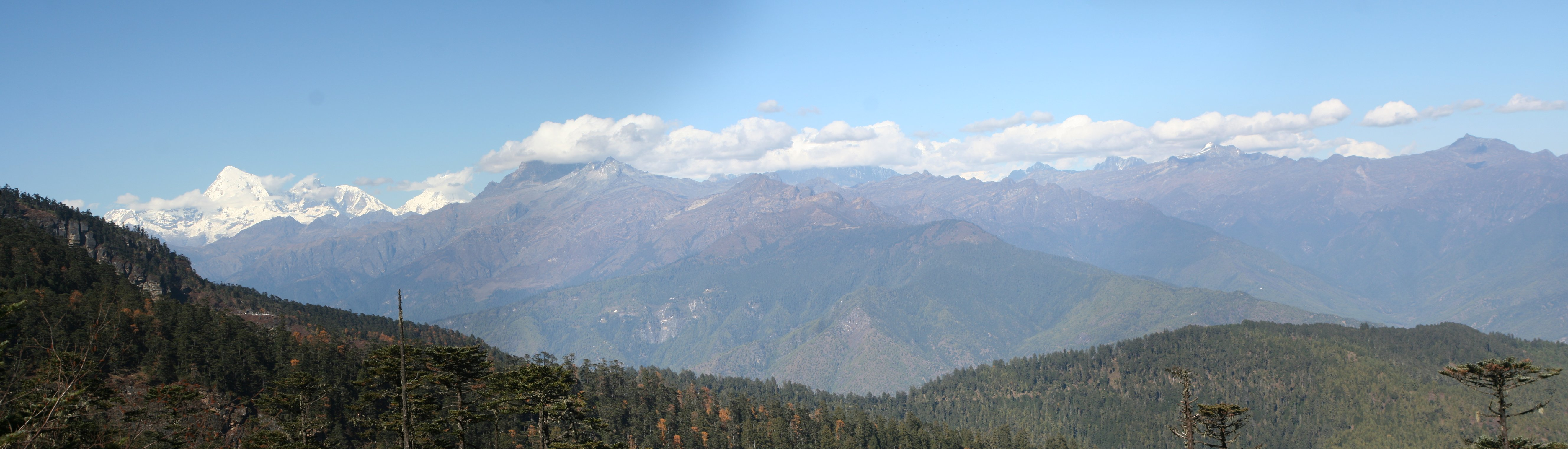 Panorama from Chele La, Bhutan